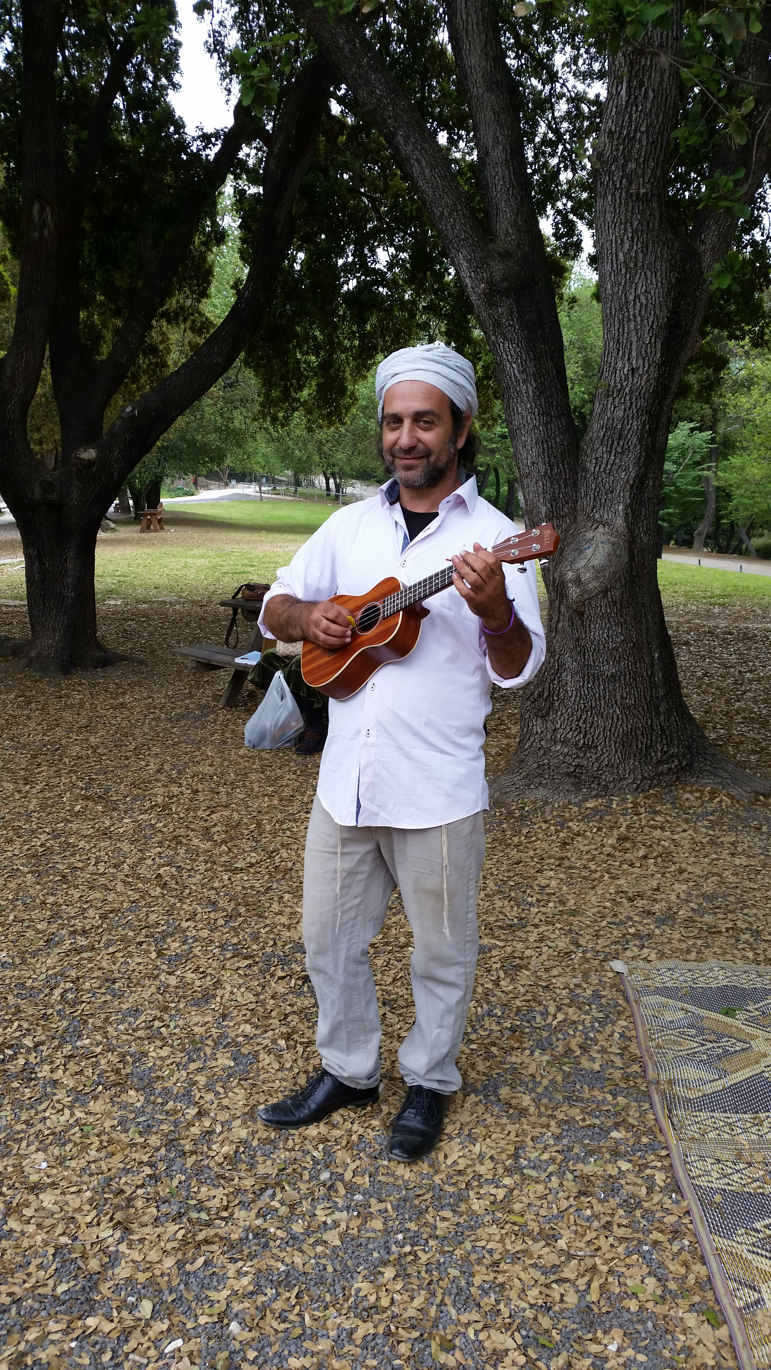 הזמר והיוצר רואי לוי בבית שערין